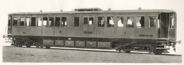 Automotrice elettrica ad accumulatori n. 002 della Rete Adriatica